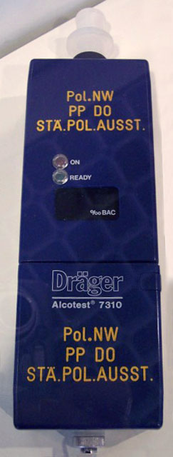 Alkotester Dräger 7310